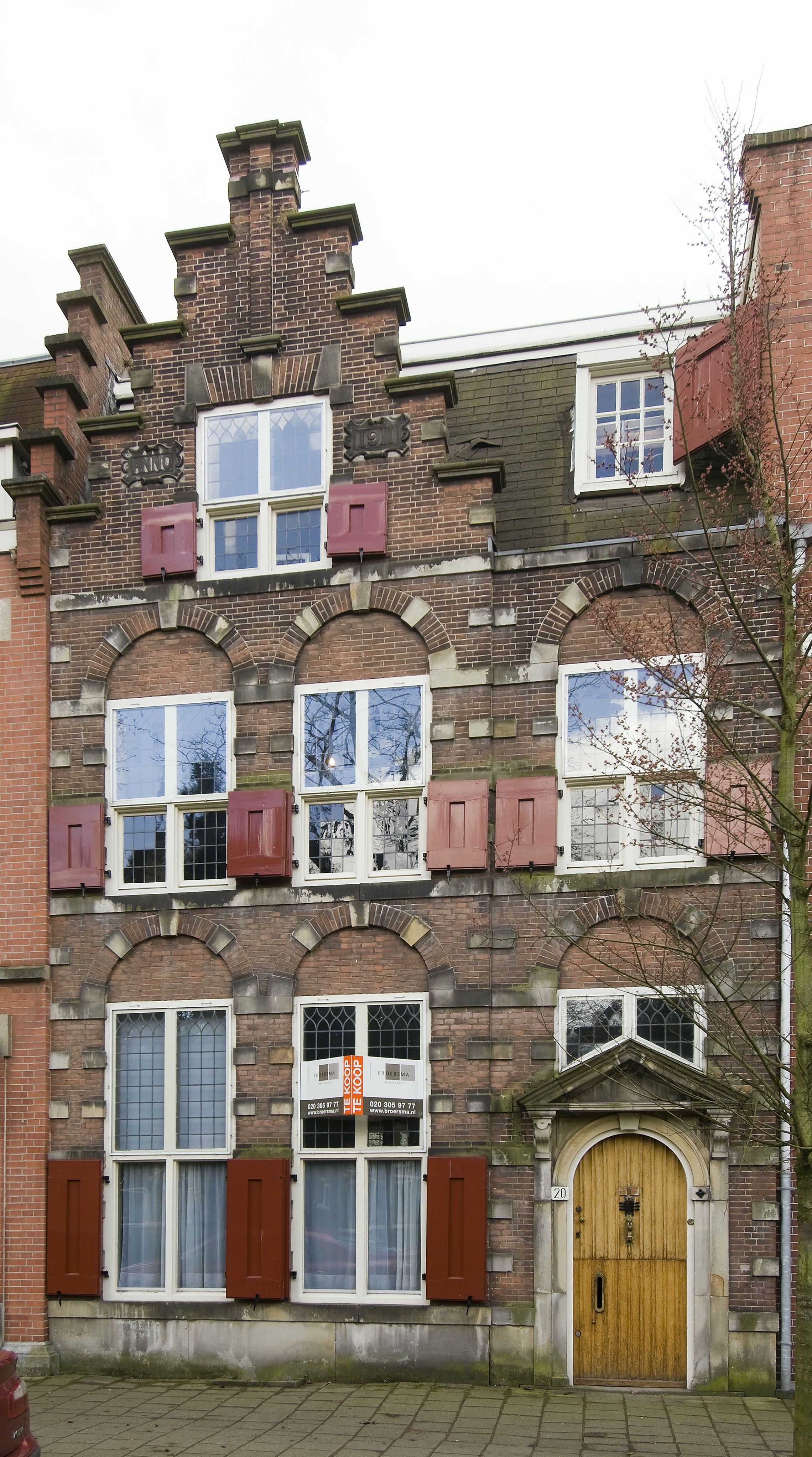 Neorenaissance/ Amsterdamse School: Overzicht van de voorgevel (opmerking: Gefotografeerd voor: 'Amsterdamse Interieurs', Huizenportretten 1875-1945.)